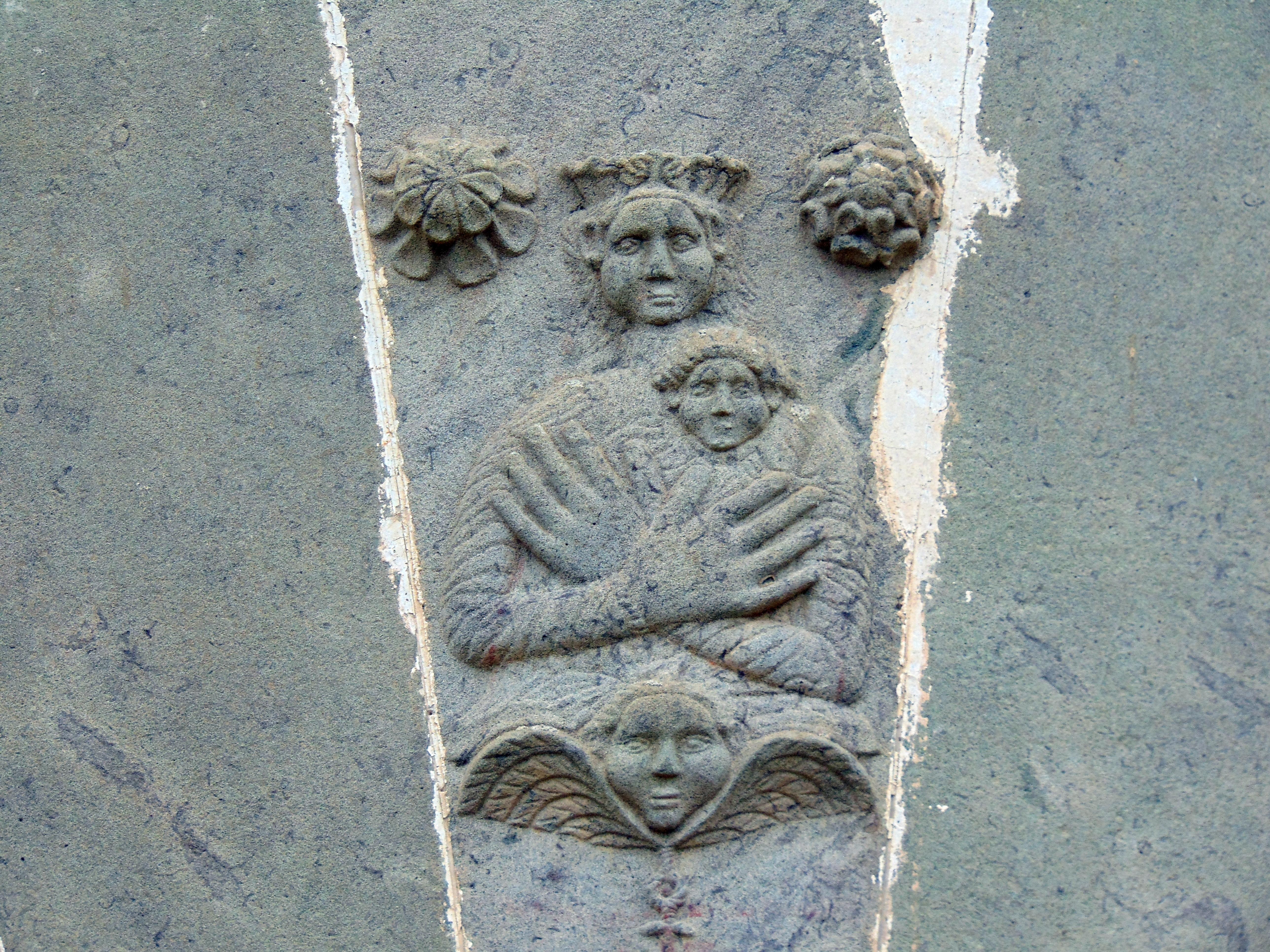 Ermita de la Verge de les Escales (l'Esquirol). Relleu a la llinda de la porta.